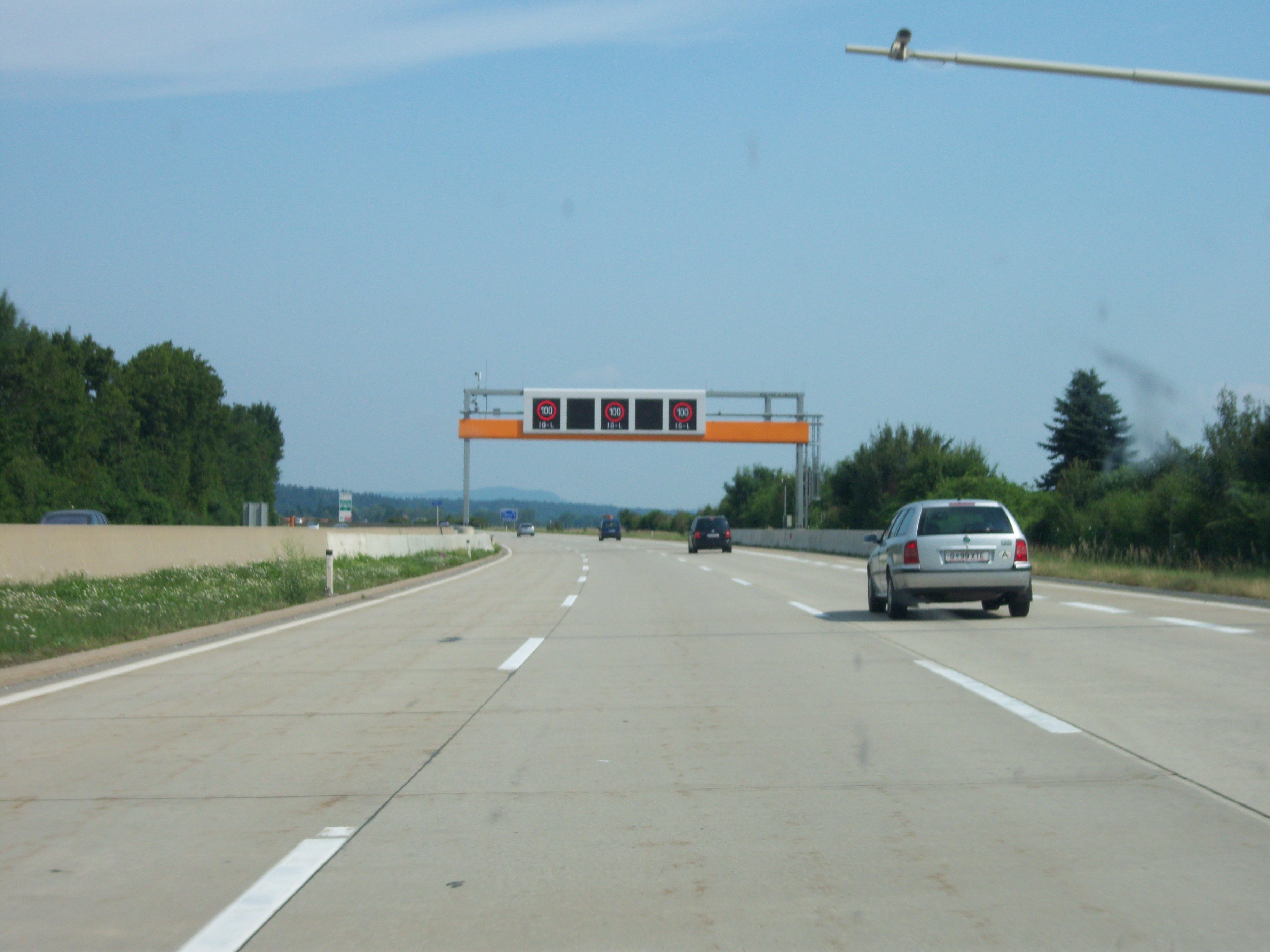 Süd Autobahn A2 Richtung Wien im Feinstaubsanierungsgebiet bei Graz - Die Verkehrsbeeinflussungsanlage schreibt Tempo 100 nach dem Immissionsschutzgesetz Luft (IG-L) vor.